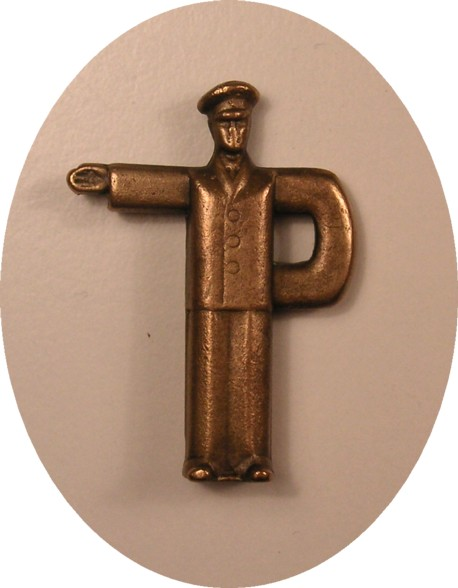 Prämeta Aufzeihschlüssel